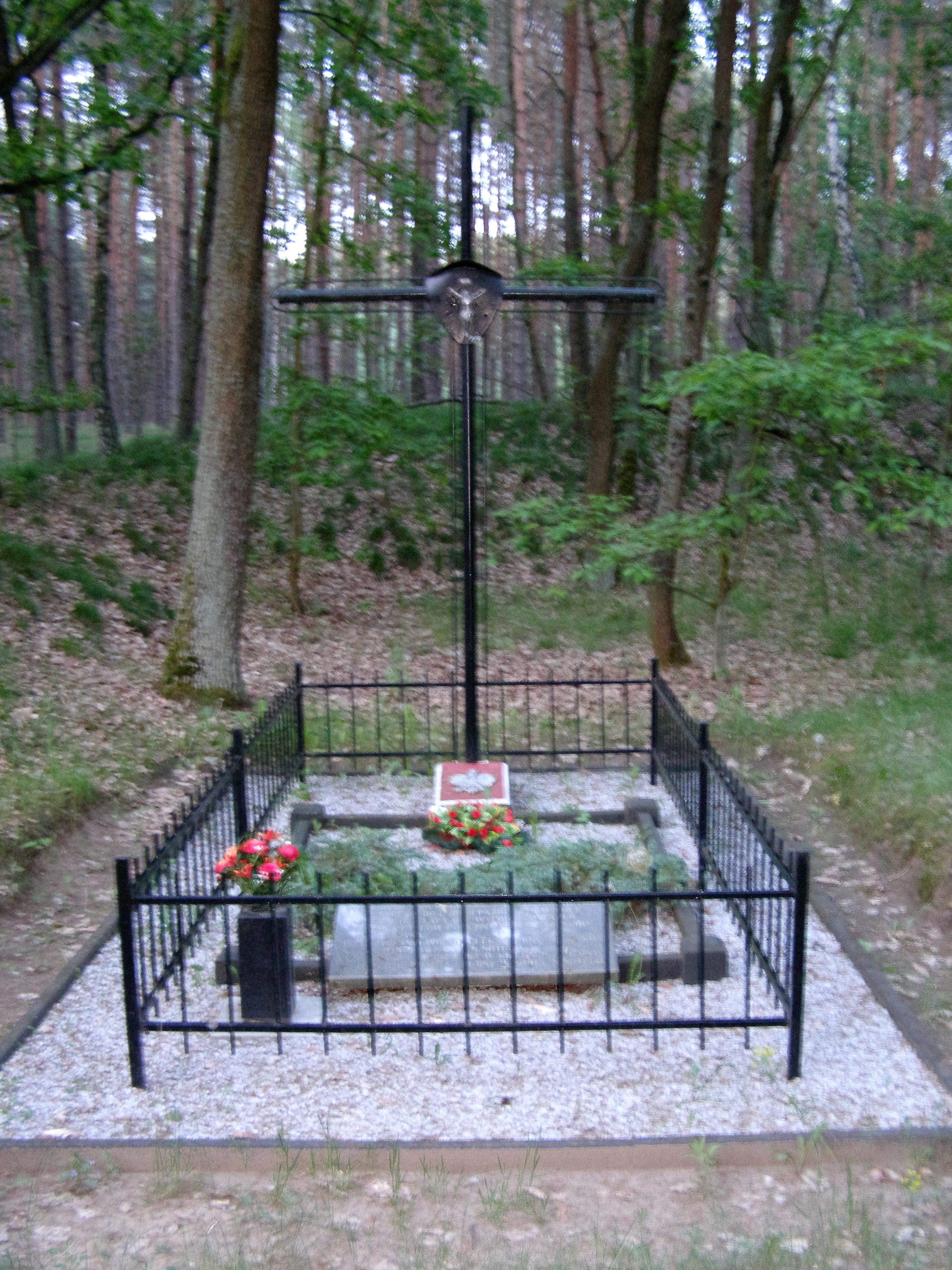 Polichno - miejsce upamiętniające zbrodnię wojenną z 1939 roku